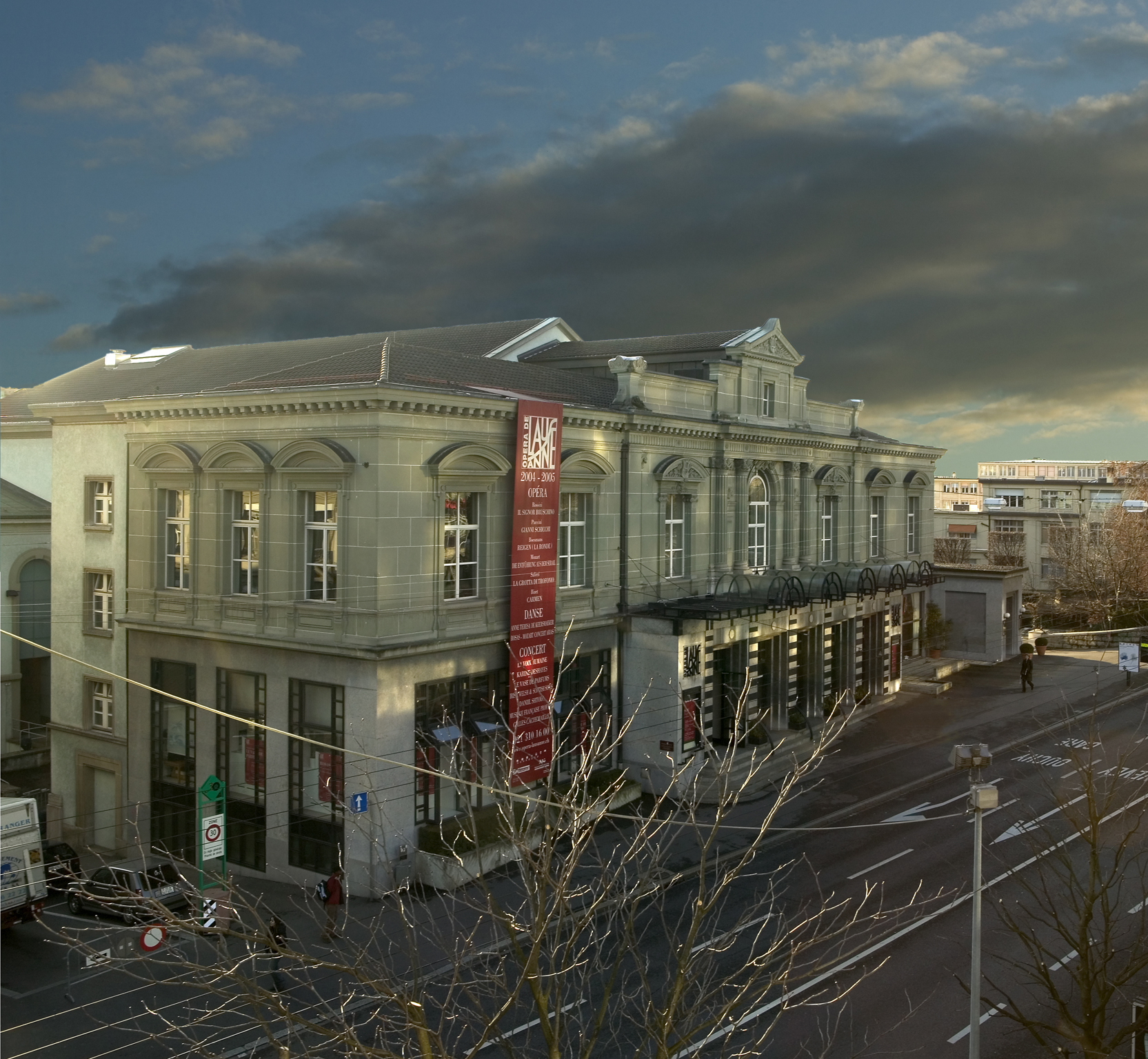 Façde de l'Opéra de Lausanne